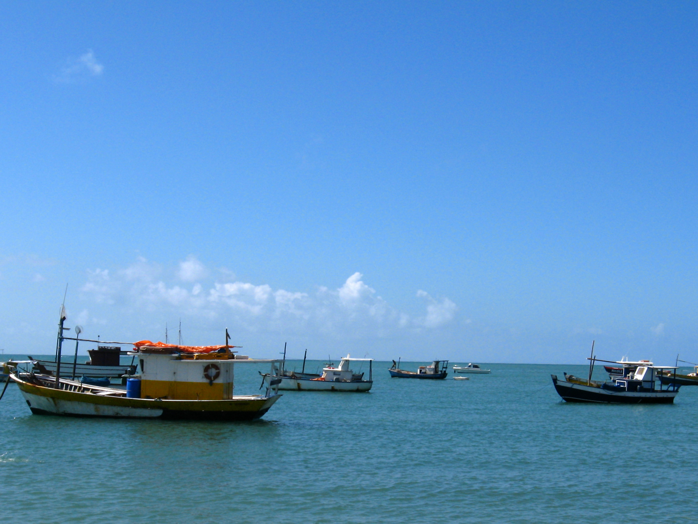 Barcos da vila de pescadores na Praia do Forte (Bahia). Boats in a fisherman ville in Praia do Forte (Bahia-Brazil).